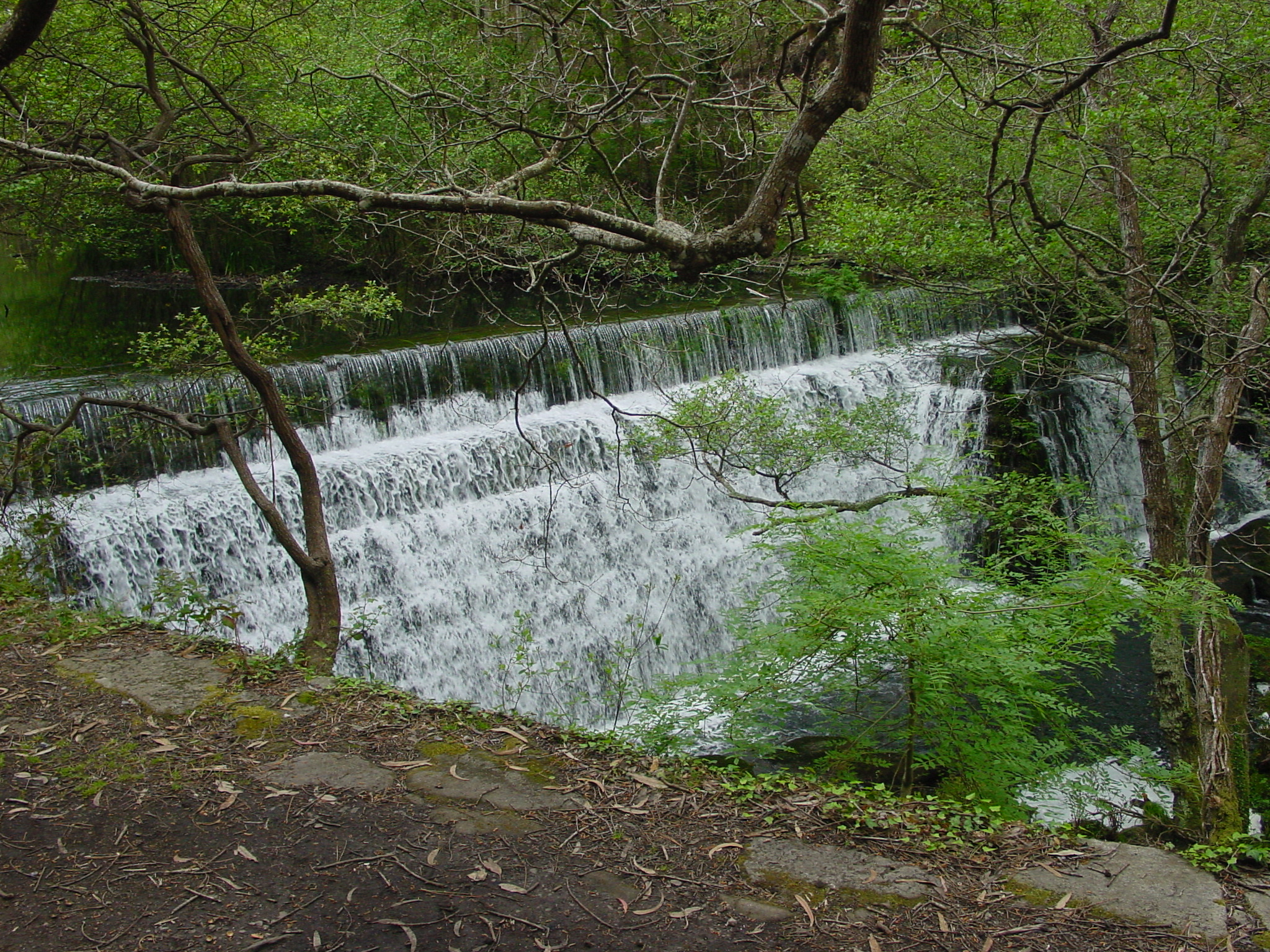 Presa en el Paseo de los Enamorados en Sargadelos, cerca de la fábrica de cerámica. Se hizo para ayudar a la maquinaria de la fábrica del siglo XIX.